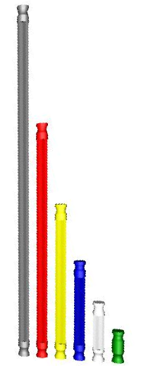 K'nex pieces